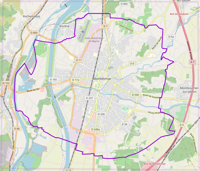 carte réalisée sur umap This map may be incomplete, and may contain errors. Don't rely solely on it for navigation.